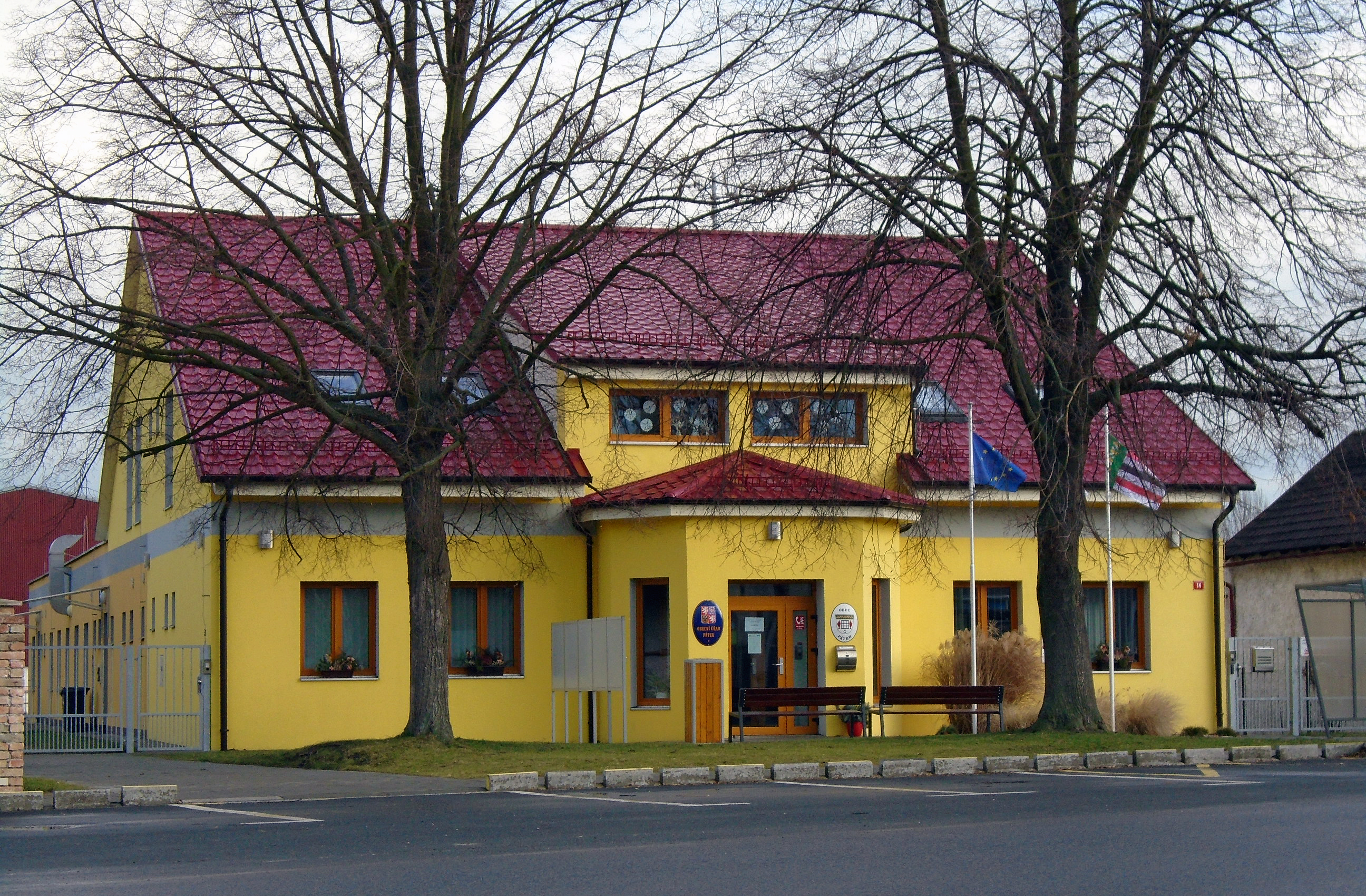 Obecní úřad v Pátku